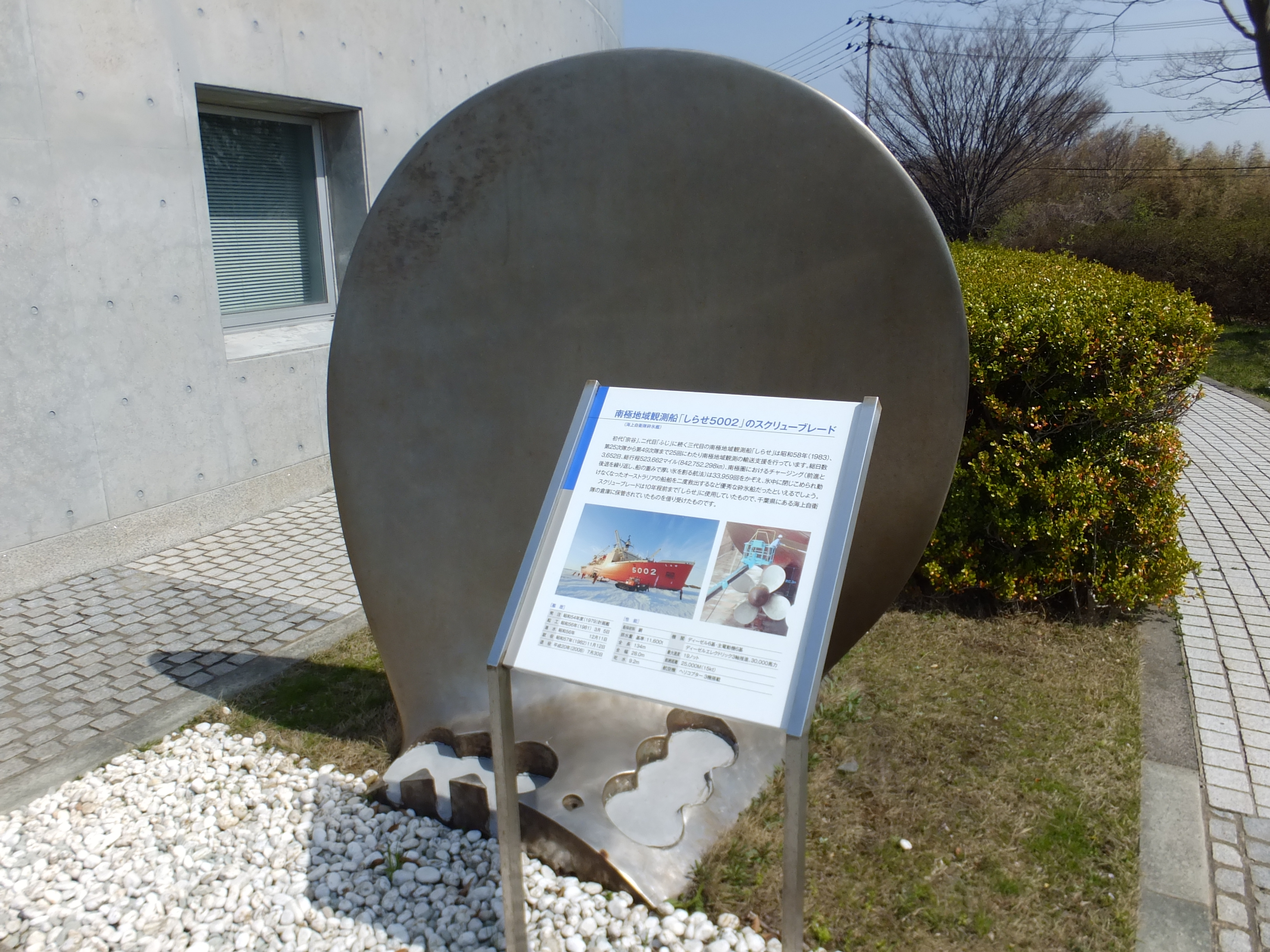 白瀬南極探検隊記念館前にて展示されている、砕氷艦「しらせ(初代)」のスクリューブレード